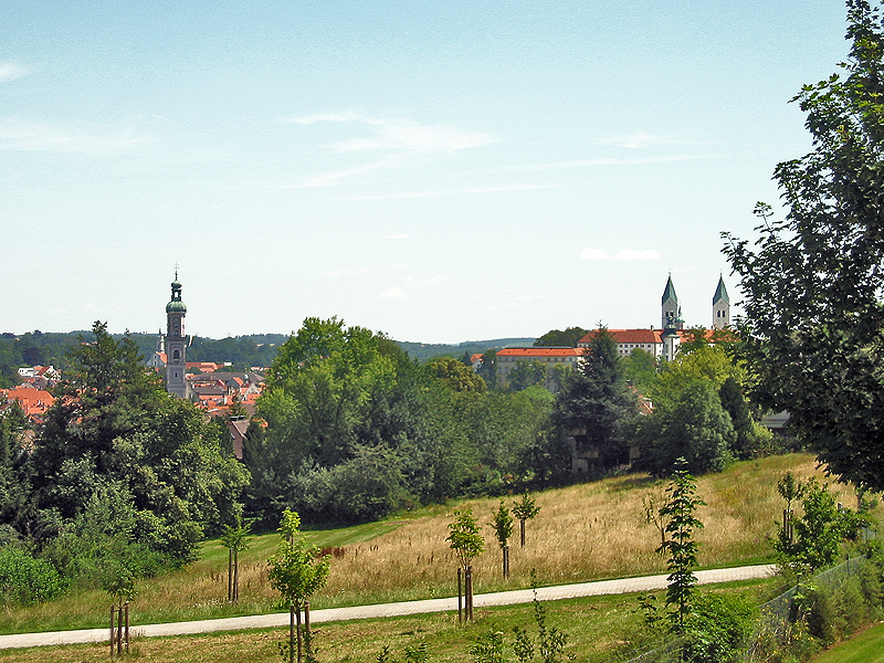 Freising (gesehen vom Weihenstephaner Berg)